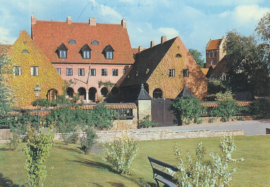 Skånegården, Båstad. Byggnadsår 1920. Arkitetekt Karl Güettler